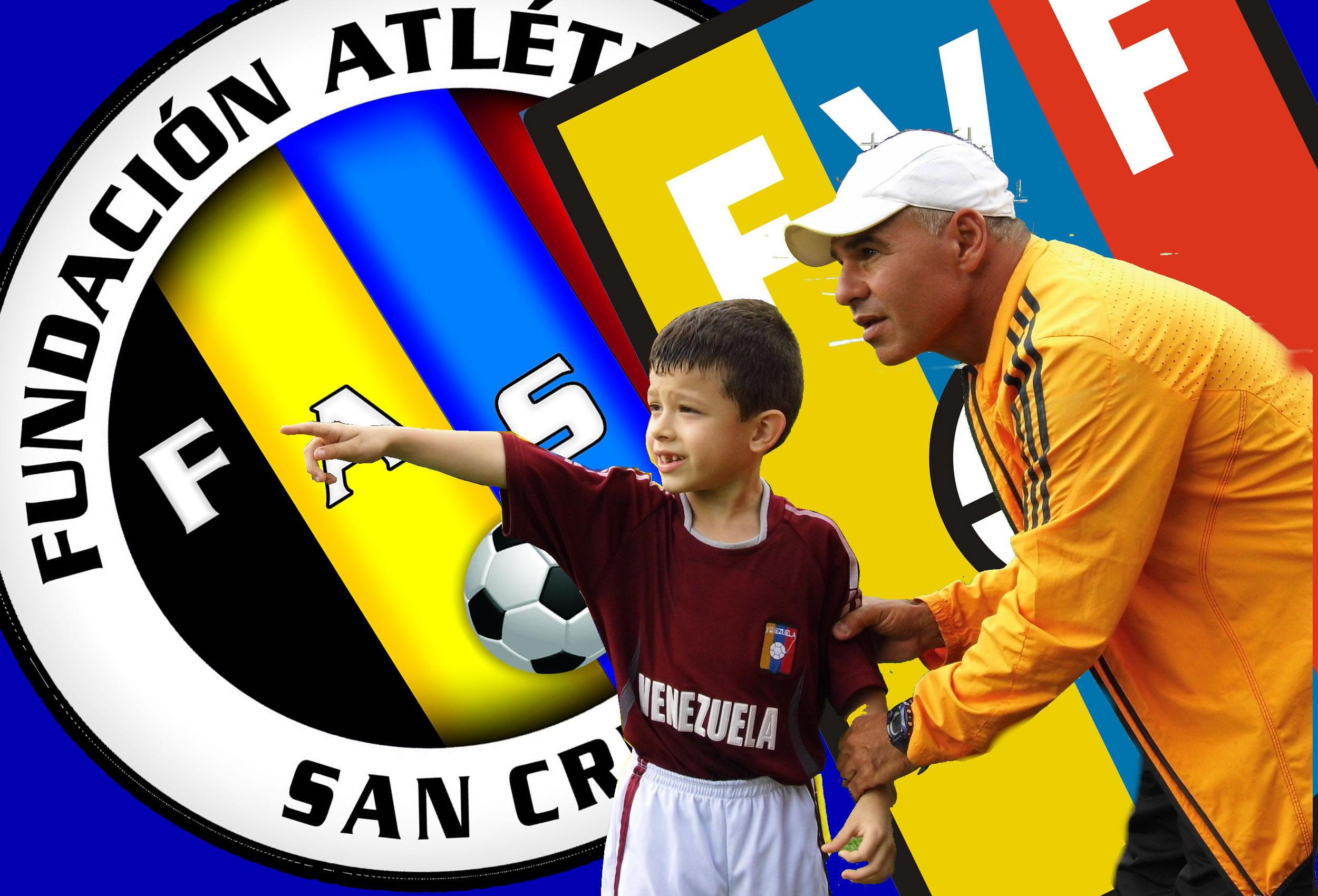 De la Fundación Atlética San Cristóbal, para la Vinotinto Sub-20